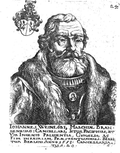 Bildnis Johann Weinlob (?-1558) nach Martin Friedrich Seidels Bilder-Sammlung